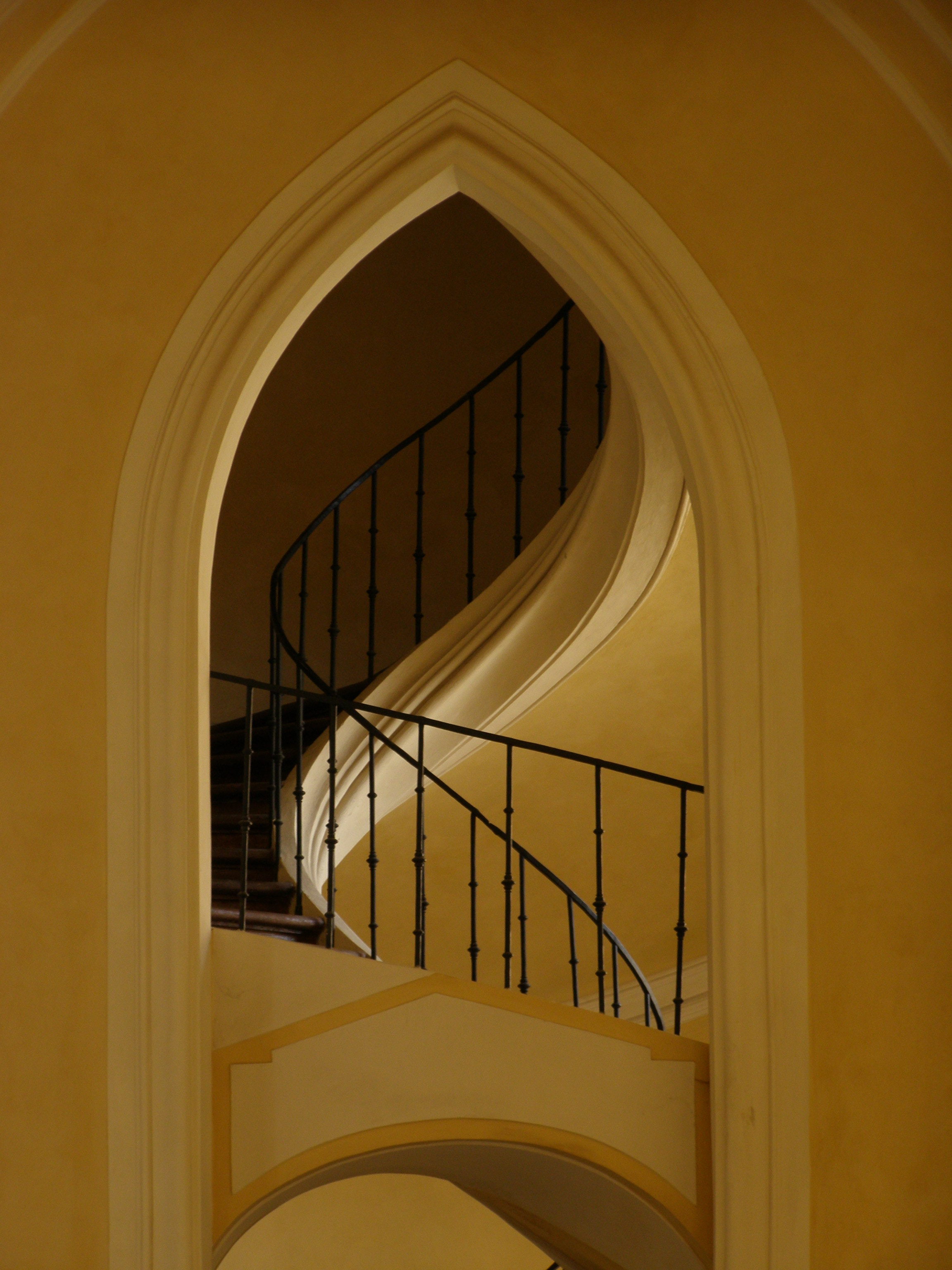 Česky: Kutná Hora, část Sedlec, klášterní kostel Nanebevzetí Panny Marie a svatého Jana Křtitele, schodiště